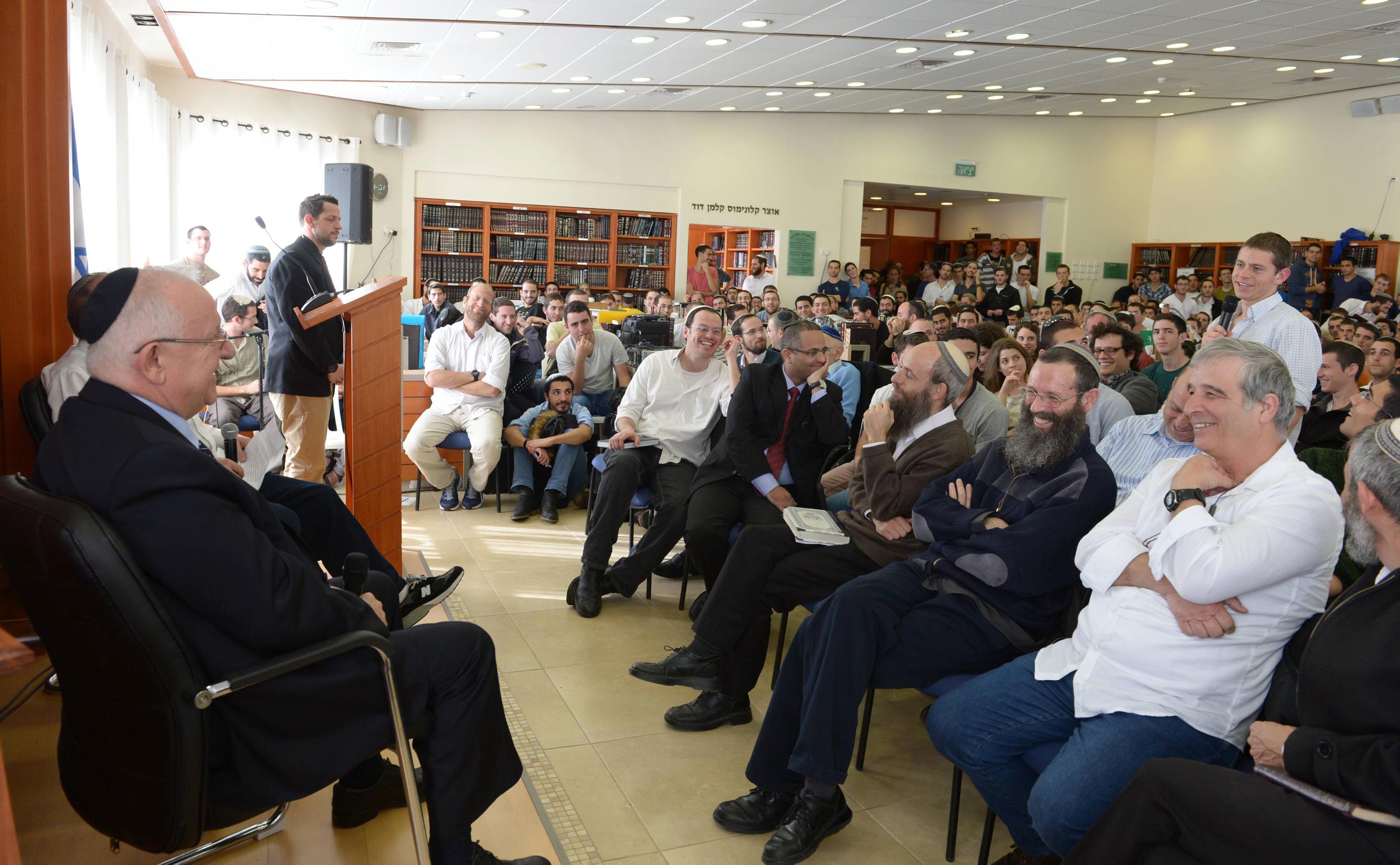 ראובן ריבלין נשיא מדינת ישראל בביקור במכינה הקדם צבאית בני דוד בעלי, בביקור נפגש עם ראשי המכינה ועם כ-400 תלמידי הישיבה לשיחה פתוחה